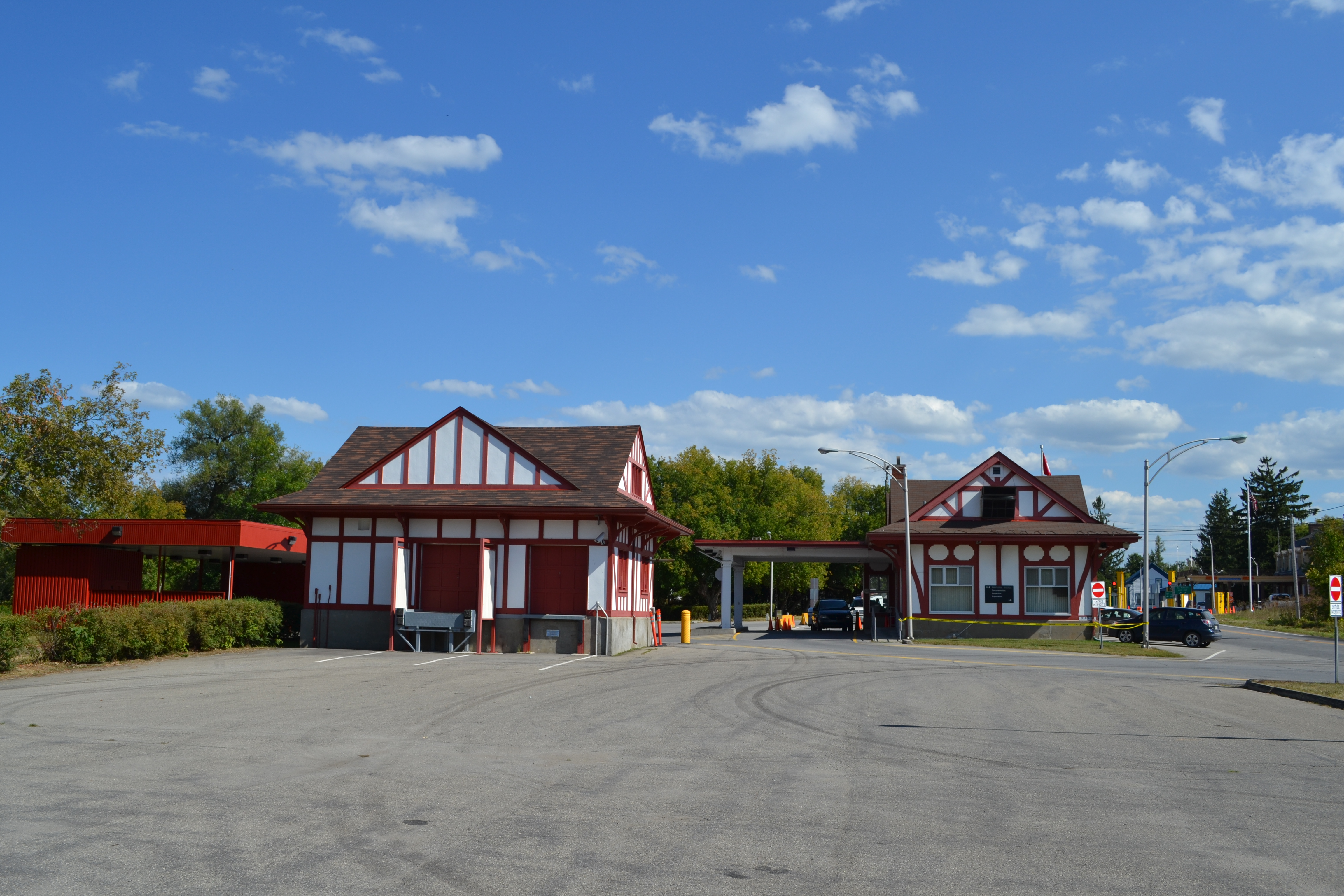 L’Édifice de la douane de l’immigration à Godmanchester est un petit bâtiment d’un étage et demi, de style néo-Tudor construit en 1933.